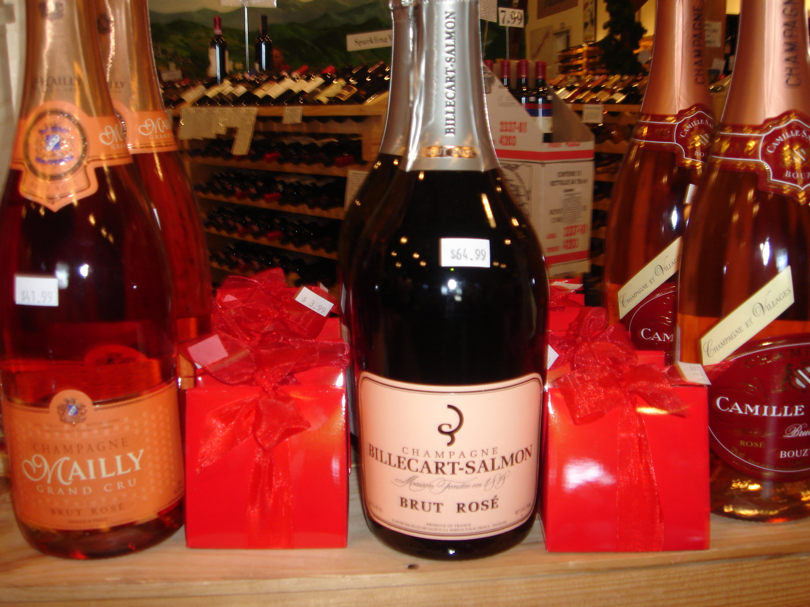 French rose Champagnes